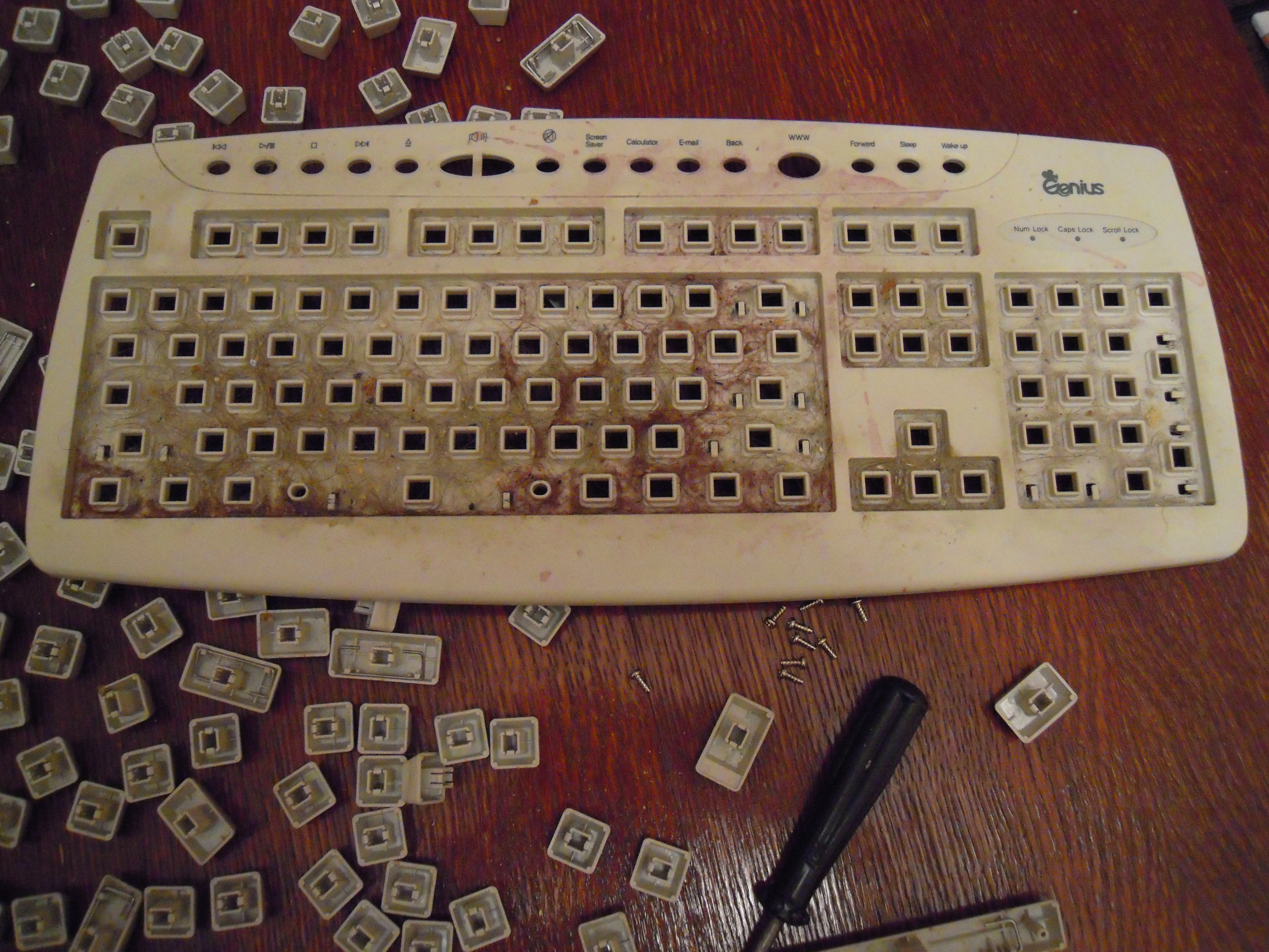 Supra parto de Geniusa komputila klavaro «KWD-910» kun la klavoj forigitaj. La klavaro longe ne estis purigita, kaj krom tio ĵus estis surverŝita per iom da suksimila trinkaĵo.